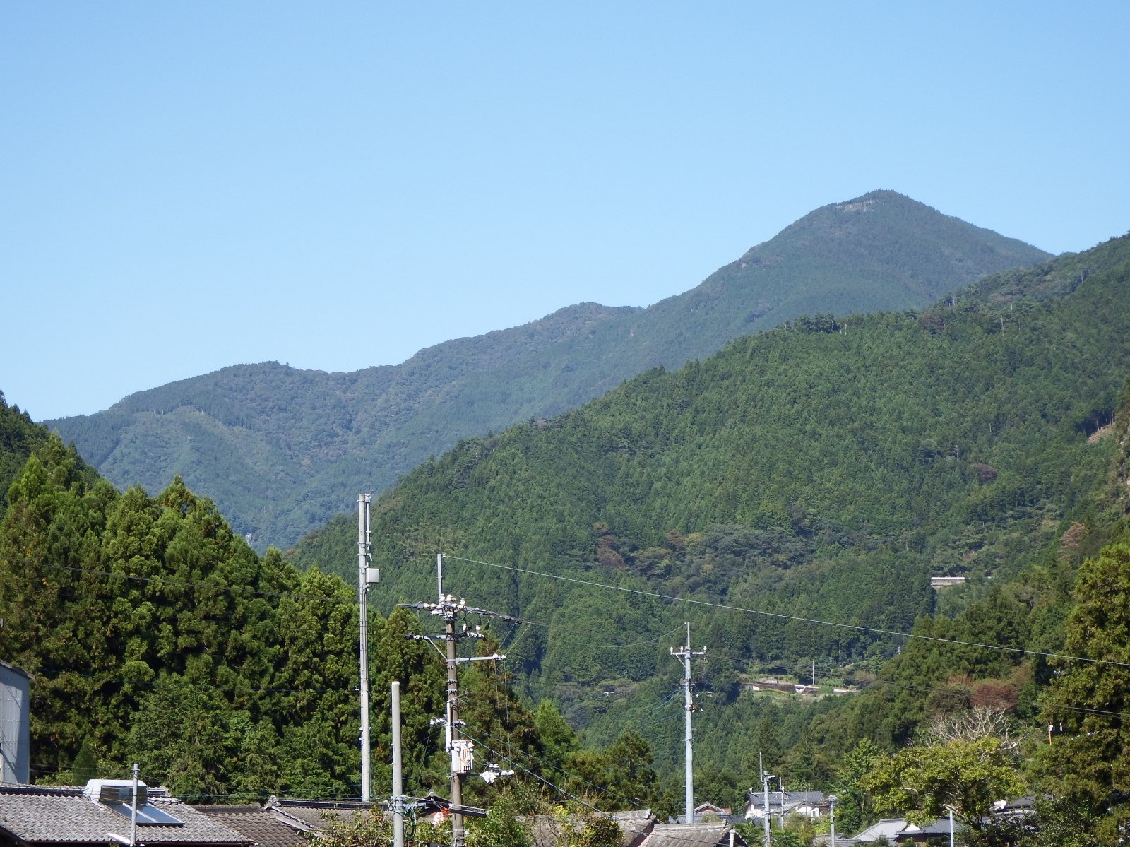 雨ガ森を見る